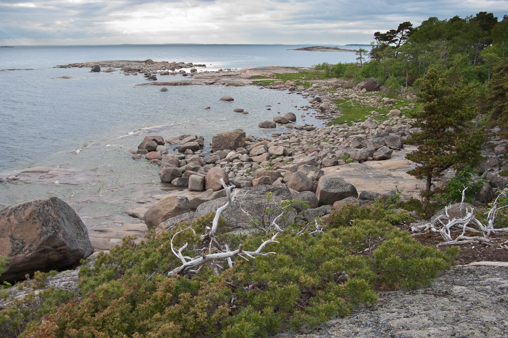 Kilpisaari